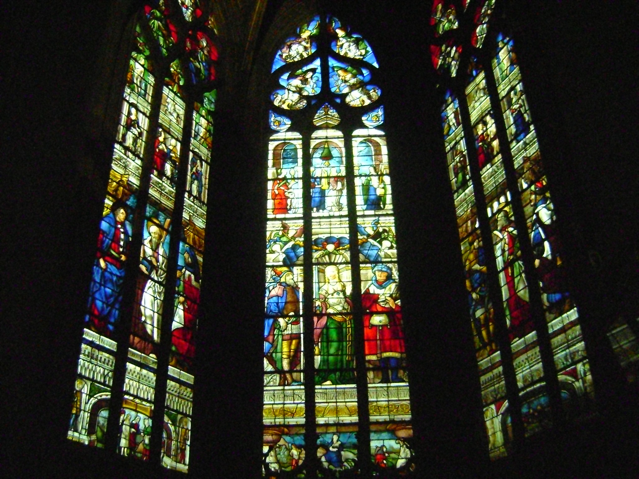 Cathédrale Sainte-Marie d'Auch, Gers. Vitraux d'Arnaud de Moles. La chapelle Sainte-Catherine. .